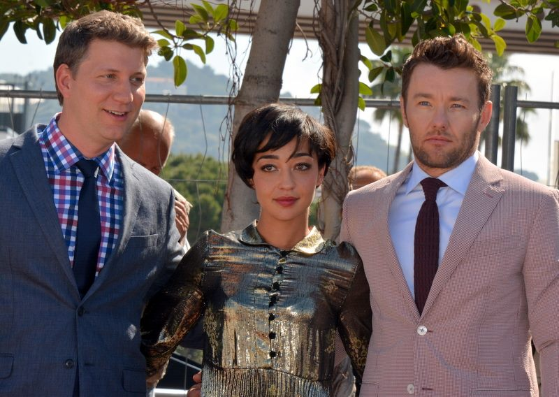 Présentation du film "Loving" au festival de Cannes : de gauche à droite Jeff Nichols, Ruth Negga, Joel Edgerton